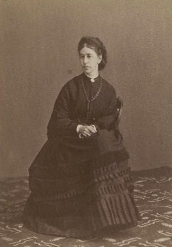 Софья Яковлевна Святополк-Мирская, ур. кнж. Орберлиани (1829—1879)